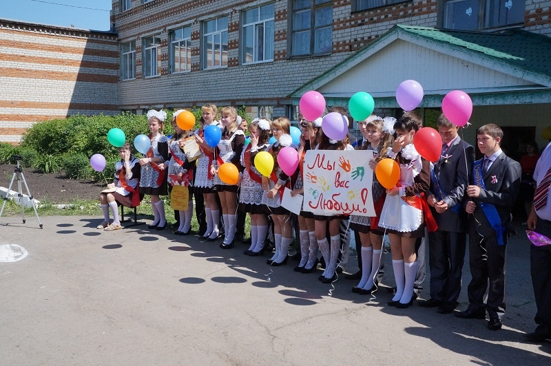 Напольное